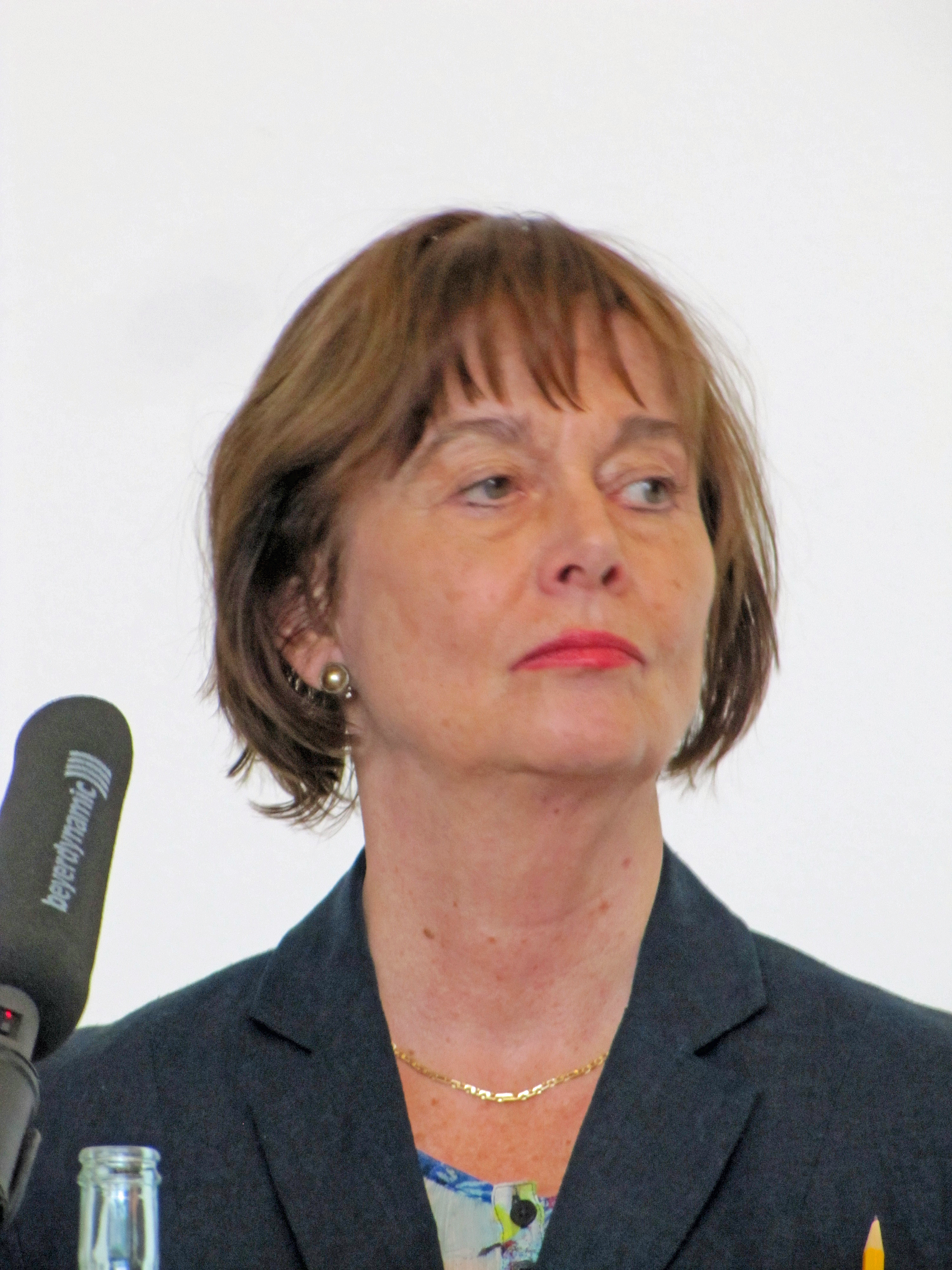 Barbara Sichtermann, am 26. September 2015, bei den Römerberggesprächen in Frankfurt am Main.